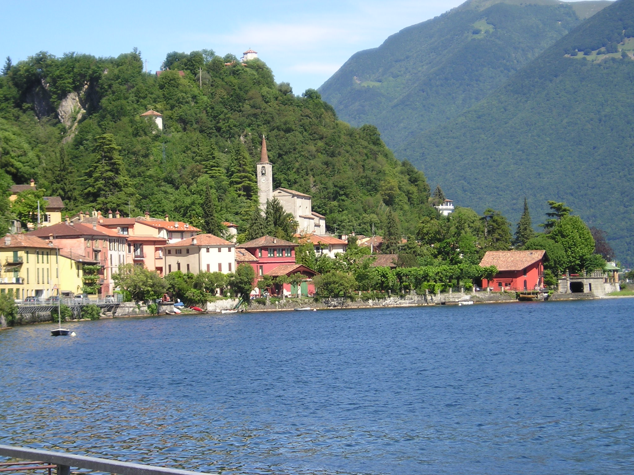 Vista de Valsolda, en el lago de Lugano Foto di Valsolda,localita' Casarico, autore Massimo Macconi